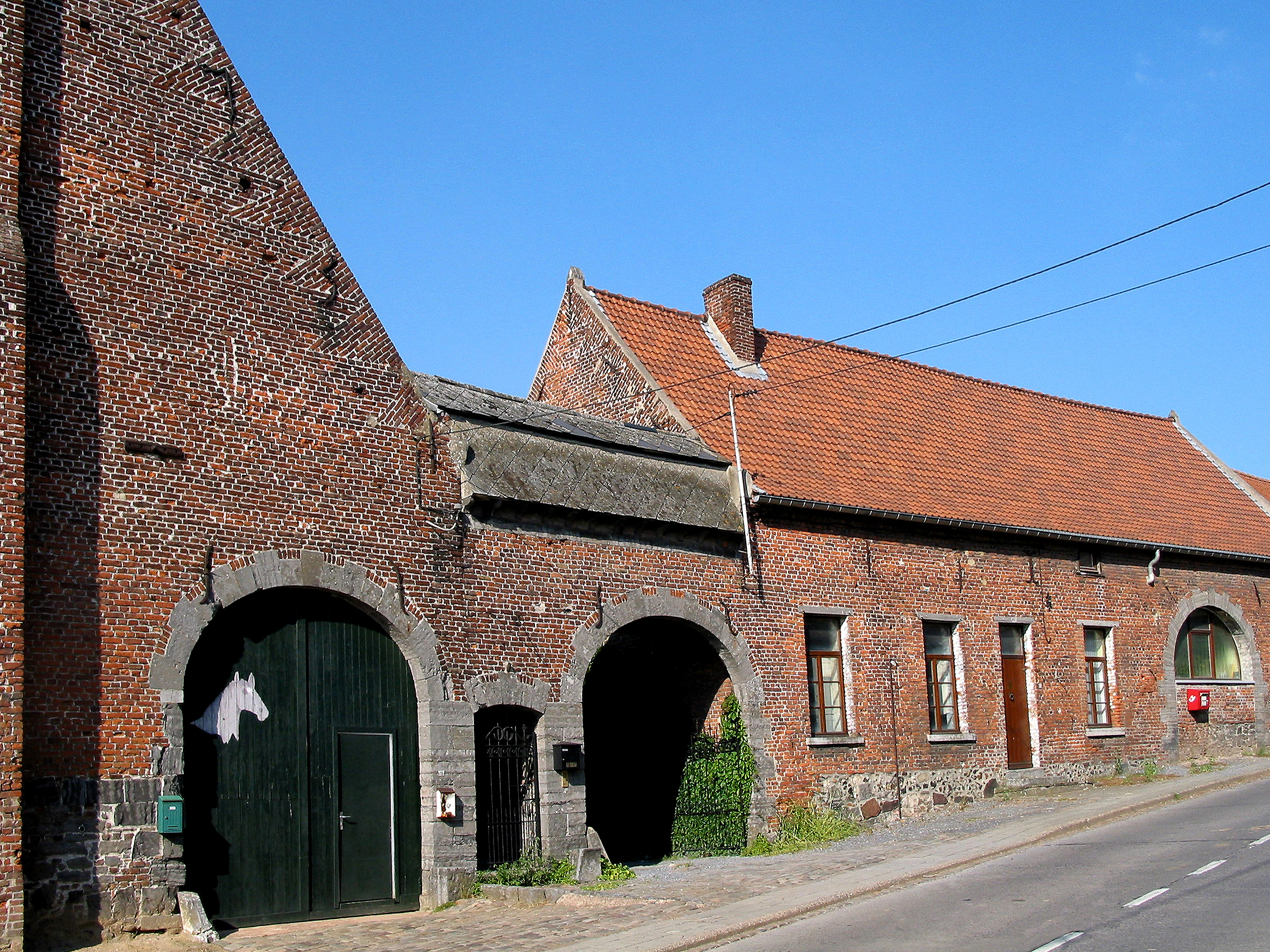 Angre (Belgique), rue Emile Cornez - Ancienne ferme typique.